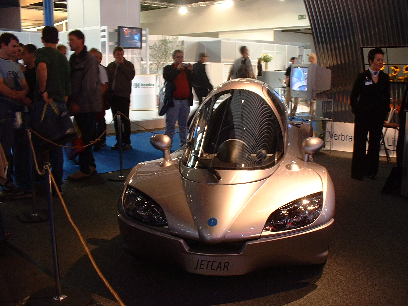 Bildbeschreibung: Jetcar Prototyp auf der IAA 2004 Quelle: selbst fotografiert Fotograf/Zeichner: Peter Klassmann (alias Benutzer:Magnummandel) Datum: 2003 (Löschen) (Aktuell) 20:12, 17. Jan 2006 . . Magnummandel (Diskussion) . . 1600 x 1200 (366600 Byte) (* Bildbeschreibung: Jetcar Prototyp auf der IAA 2003 * Quelle: selbst fotografiert * Fotograf/Zeichner: Peter Klassmann (alias Benutzer:Magnummandel) * Datum: 2003)